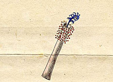 Ausschnitt (Klasse I) aus Ehrets Tafel "Methodus Plantarum Sexualis"